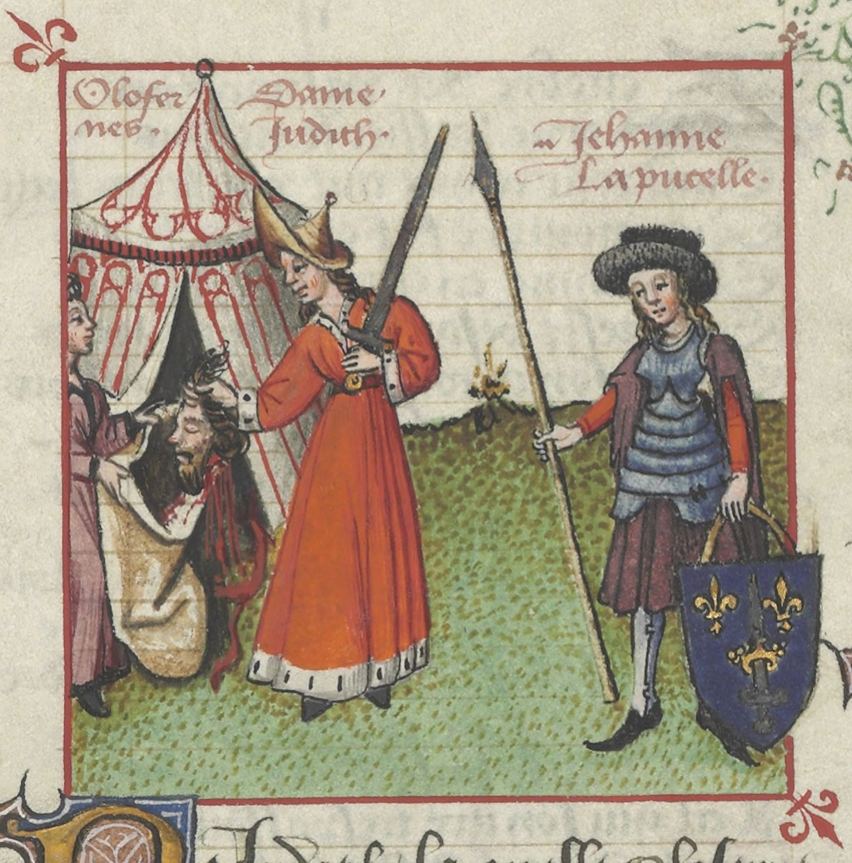 Enluminure représentant Jeanne d'Arc aux côtés de Judith tenant la tête coupée d'Holopherne. Martin Le Franc, Le Champion des dames, Paris, BnF, département des Manuscrits, ms. Français 12476, folio 101 verso, 1440.